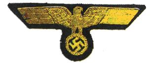 Mützenabzeichen (Wehrmacht und Adolf Hitler).